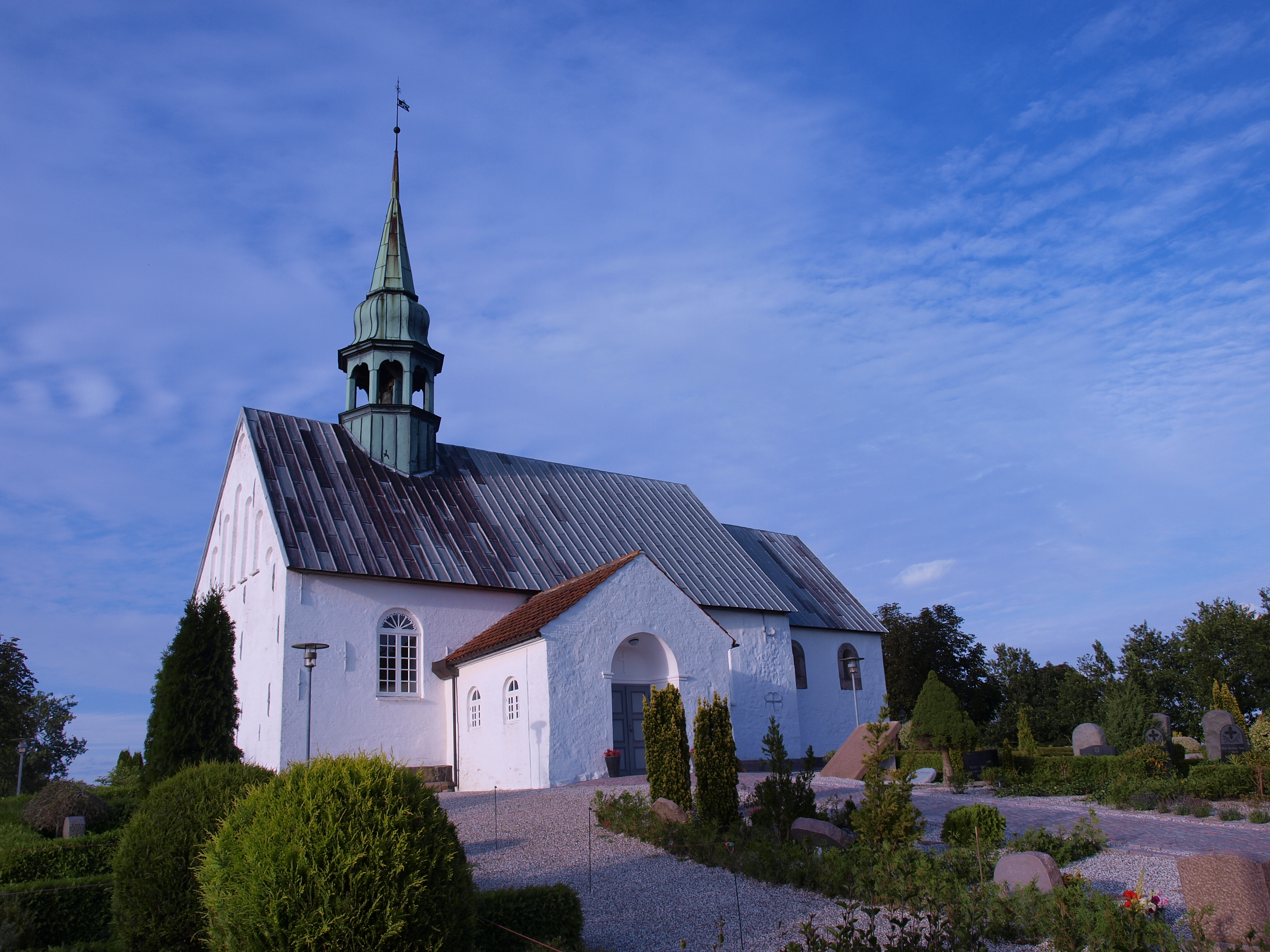 Viuf Kirke august 15